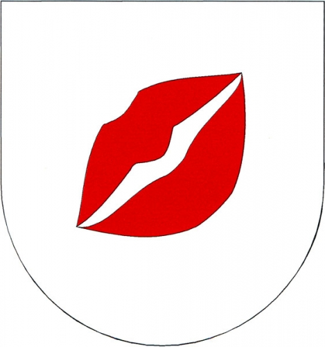 znak, Milasín, okres Žďár nad Sázavou